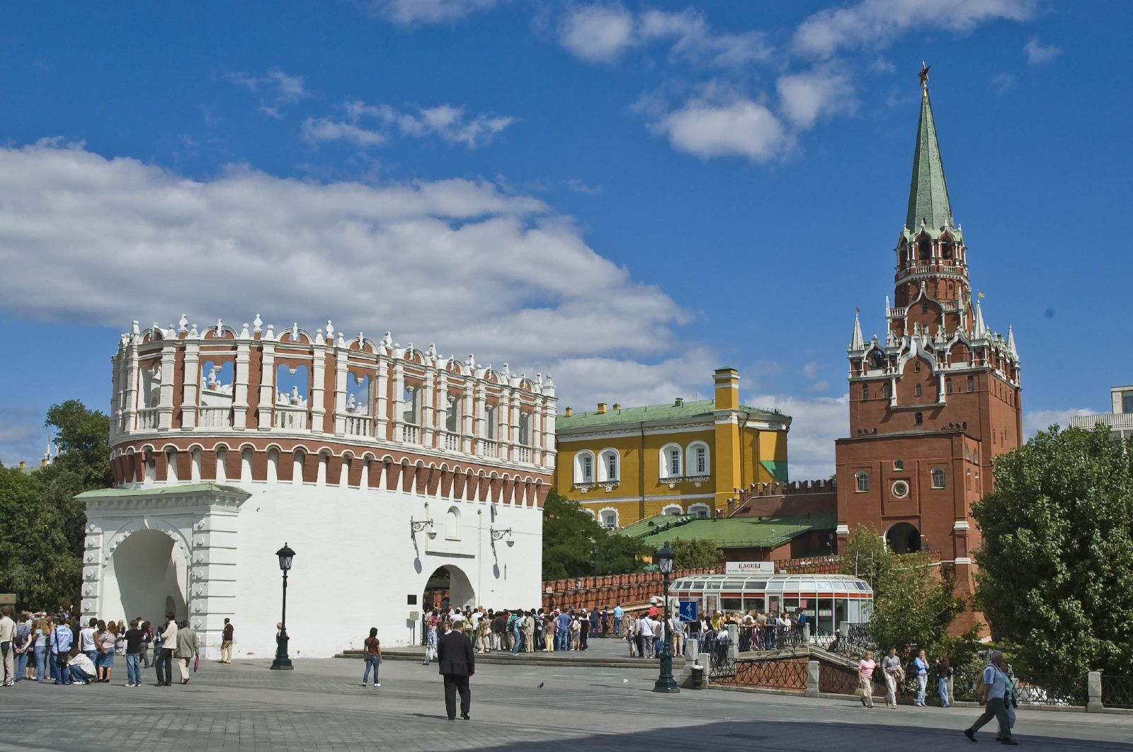 Kutafia Tower (Kremlin)